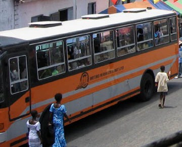 Kumasi, Ashanti, Asanteman Transit bus service and Bus rapid transit system.